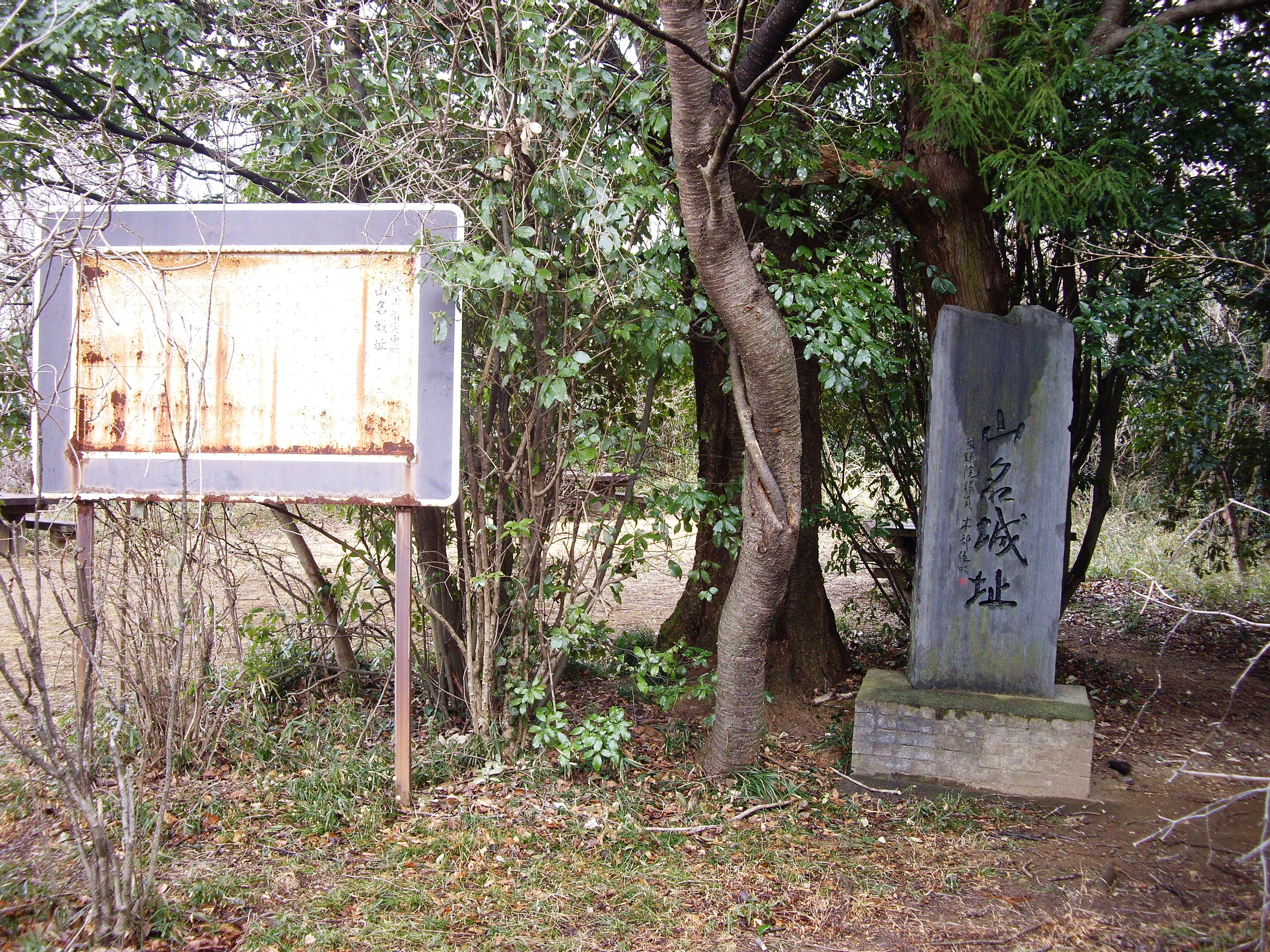 山名城跡（群馬県高崎市）